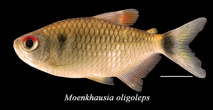 Moenkhausia oligolepis. Bosque Nacional de Tapajós, Brasil. Silva-Oliveira C, Canto ALC, Ribeiro FRV (2016) Stream ichthyofauna of the Tapajós National Forest, Pará, Brazil. ZooKeys 580: 125-144.